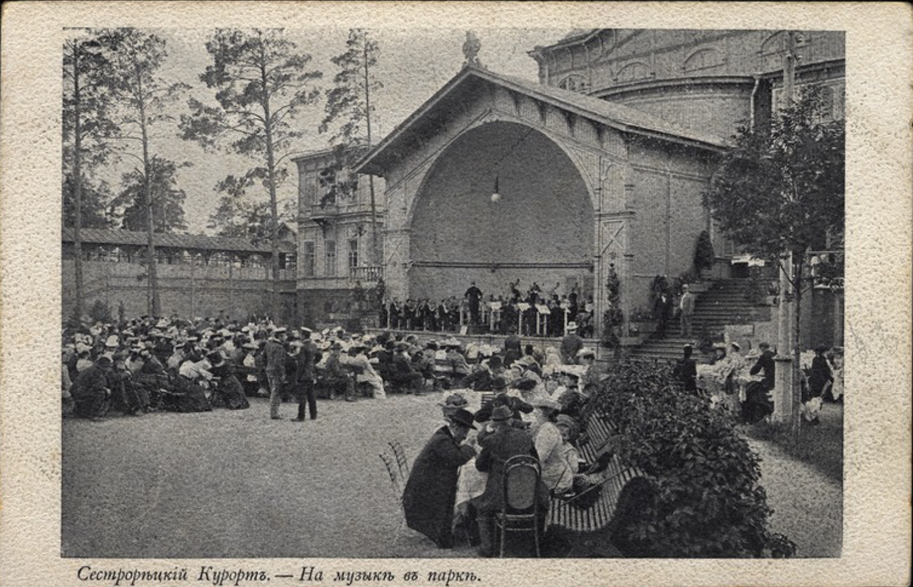 Сестрорецкий курзал